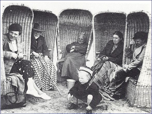 German Grobe (2e vl) und seine Familie in Katwijk